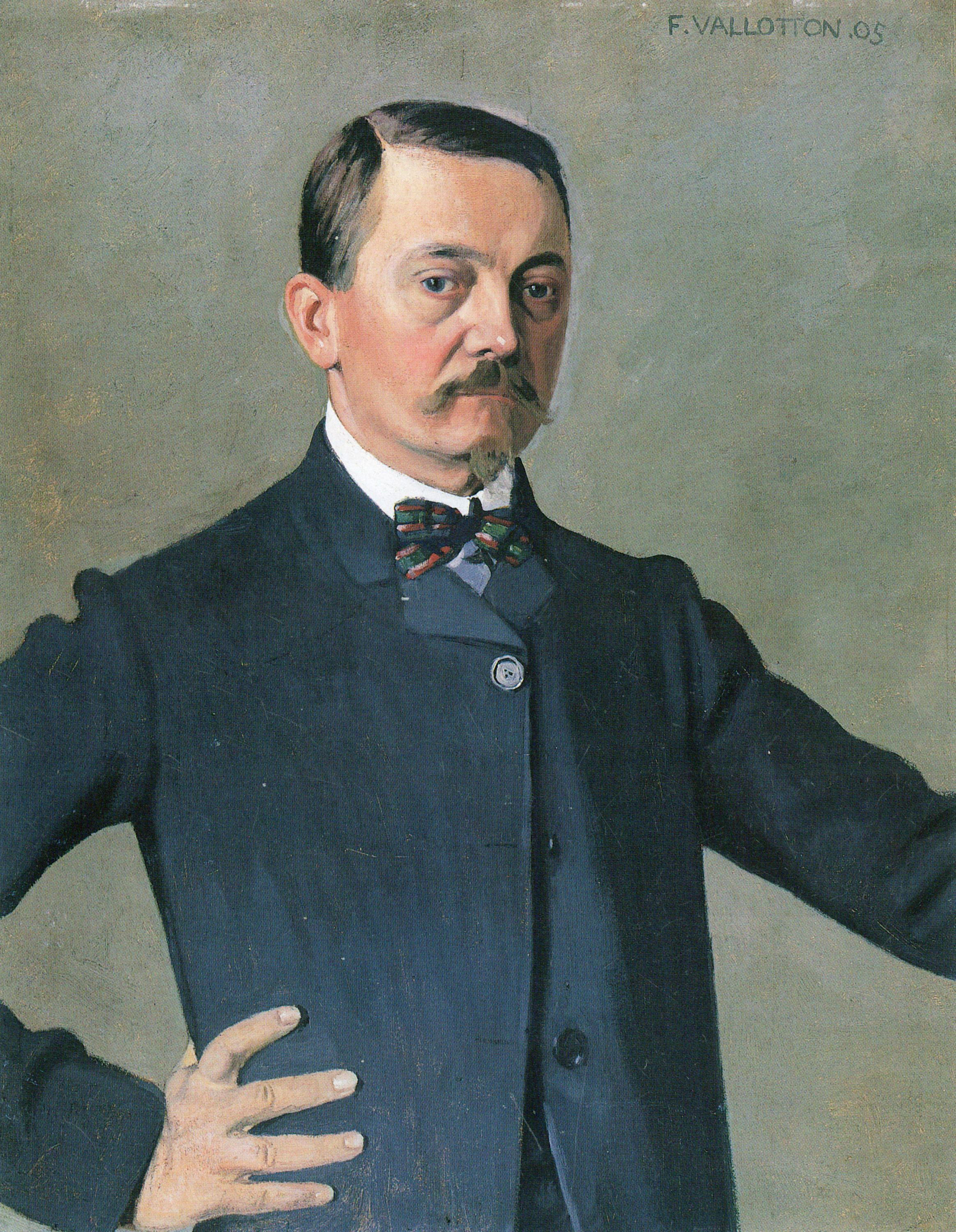 Selbstbildnis von Félix Vallotton, Öl auf Karton 82 × 64,5 cm, Kunsthaus, Zürich.